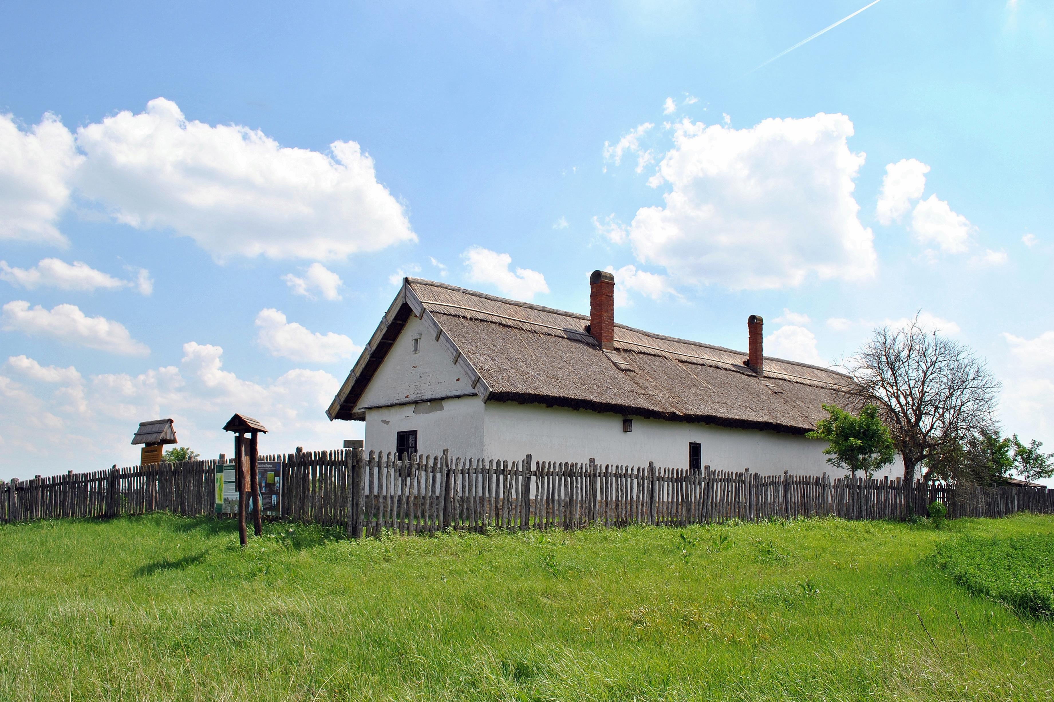 Nyakvágó csárda. Eredetileg étterem. A Pest-Pétervárad közötti postaút állomása volt. Négy épületből álló épületegyüttes. Népi műemlék. - Bács-Kiskun megye, Kunszentmiklós, Külterület, a Szabadszállásra vezető út mentén jobbra, Kunszentmiklóstól mintegy 7 km-re This is a photo of a monument in Hungary. Identifier: 2323